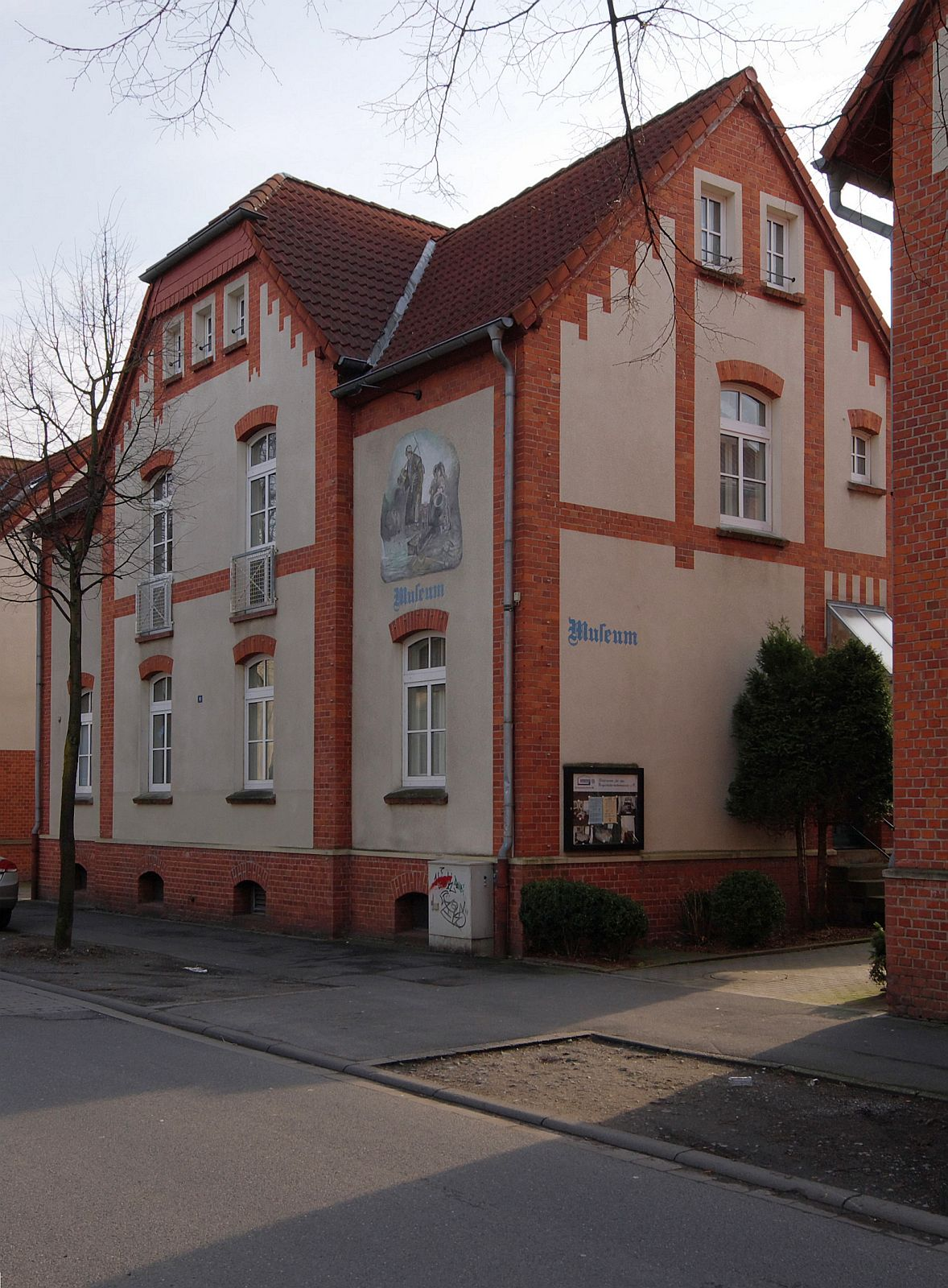 Bergarbeiterwohnmuseum, Lünen-Brambauer, Nordrhein-Westfalen